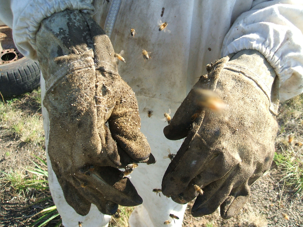 Entre las abejas melíferas (y sólo entre ellas) el aguijón, un ovipositor modificado como en otros himenópteros picadores, tiene forma de anzuelo, alojándose en la carne de la víctima tras desprenderse del cuerpo de la abeja, lo que provoca la muerte de ésta en pocos minutos. El aguijón tiene su propio ganglio (esencialmente un cerebro en miniatura) que le permite ahondar en la carne de la víctima y liberar veneno durante varios minutos. La cuestión de cómo tal rasgo ha podido evolucionar, cuando es un una desventaja obvia para el individuo, queda resuelta cuando se advierte que los mamíferos predadores pueden destruir fácilmente una colonia completa si no se les repele. Si la colonia es destruida las obreras, que son estériles, morirán sin descendencia, así que sólo mediante la defensa de la colonia puede lograr que sus genes se transmitan. Las puntas de los aguijones aseguran que un ataque de una abeja melífera sólo es suicida si la víctima es un mamífero, pudiendo picar a otras abejas (en batalla intercoloniales) repetidamente. Así, bajo condiciones naturales, el carácter suicida del aguijón de la abeja melífera sólo entra en juego en caso de un atacante que amenace con destruir toda la colonia. El aguijón de todas las demás abejas y avispas no tiene esta punta, por lo que puede ser usado para picar a mamíferos repetidamente (o, más precisamente, picar a mamíferos y seguir vivas para picar otro día). Fuente